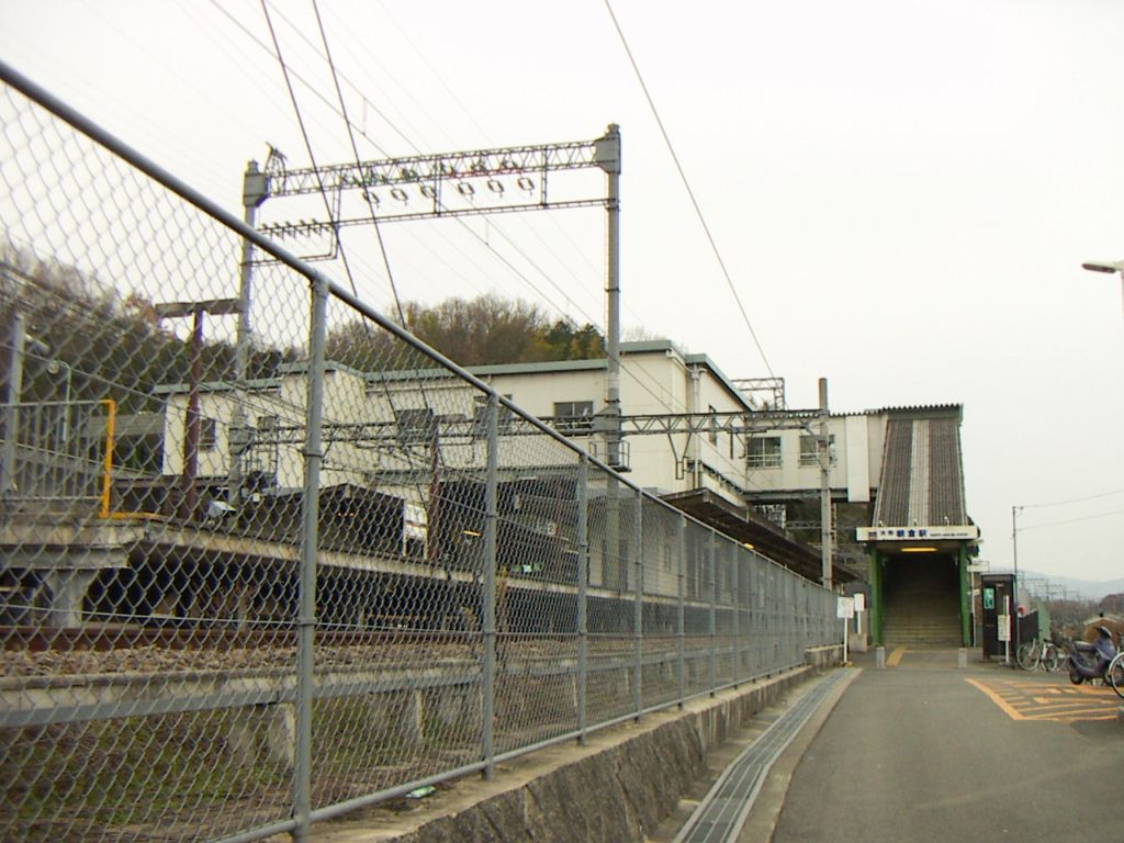 大和朝倉橋上駅舎(2006.01.04に投稿者が撮影)